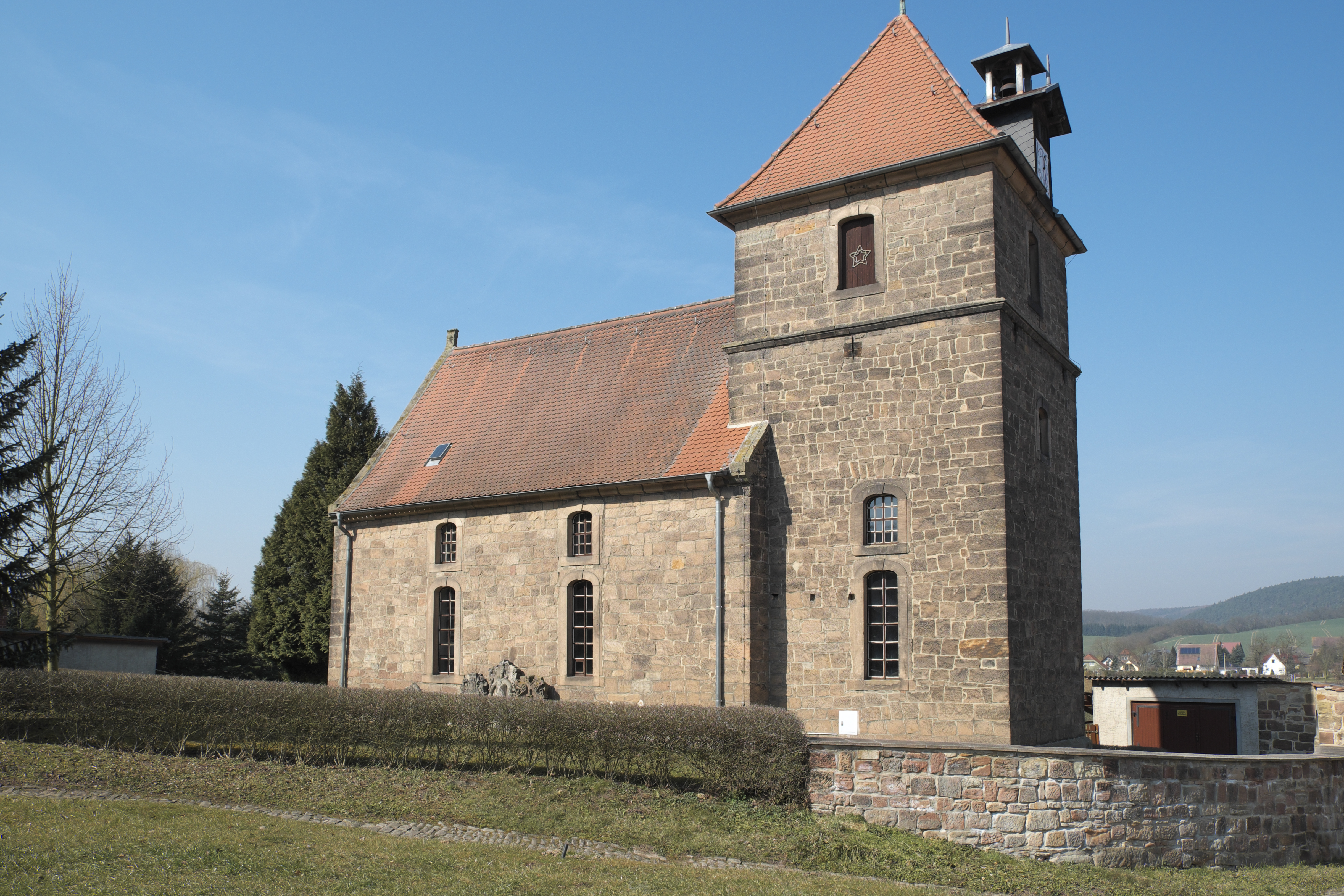 Kirche von Großwangen, einem Ortsteil von Nebra (Unstrut) im Burgenlandkreis in Sachsen-Anhalt/Deutschland